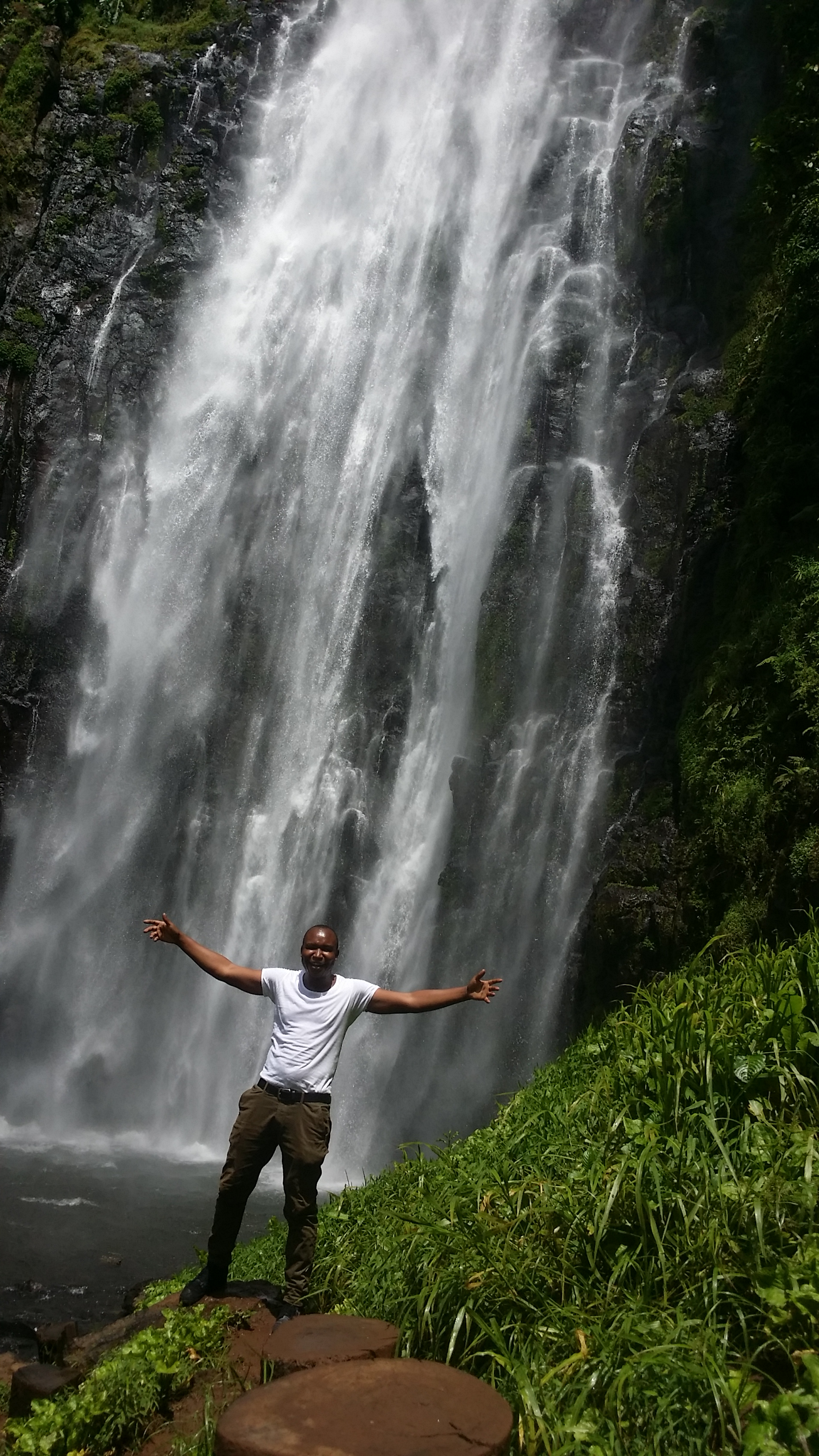 Kiswahili: Kivutio cha utalii Materuni